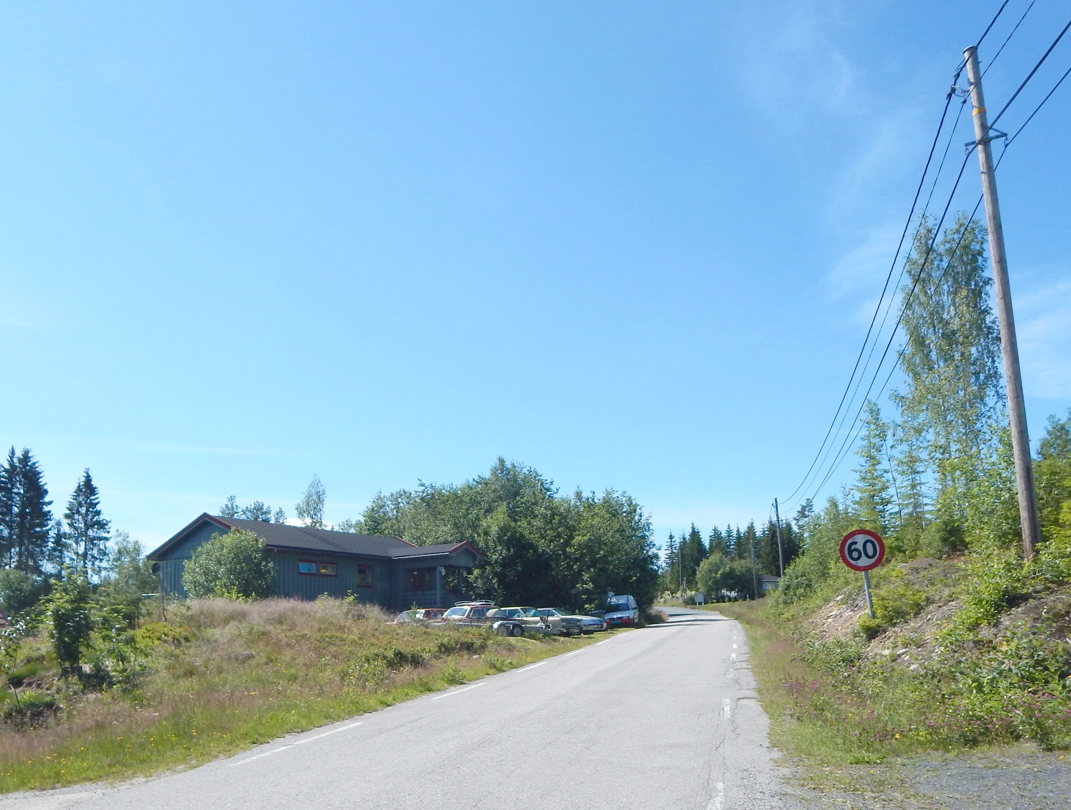 Horndalsvegen (FV2136, tidl. FV542)